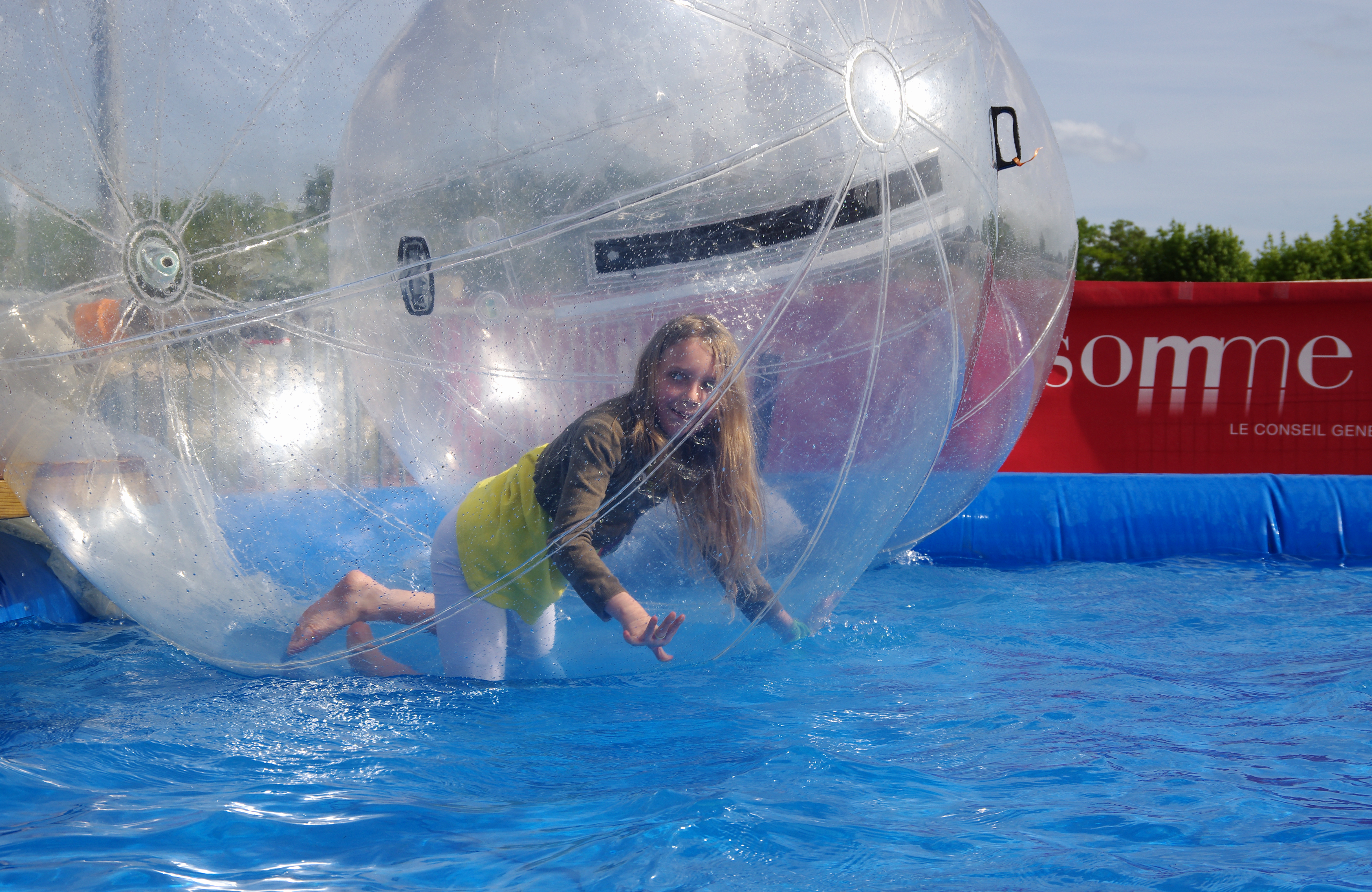 Longueau (Somme, France) - REAL Acte II « Rencontres Européennes Artisanales de Longueau » - Après-midi du deuxième jour d'animation festive au Parc des sports (rue Lucette Bonard). Alors que le groupe de majorettes hongroises assure sa prestation, des enfants préfèrent s'amuser dans les aquabulles. .